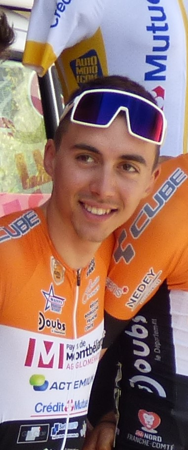 Jérémy Bellicaud lors du Tour Alsace 2019